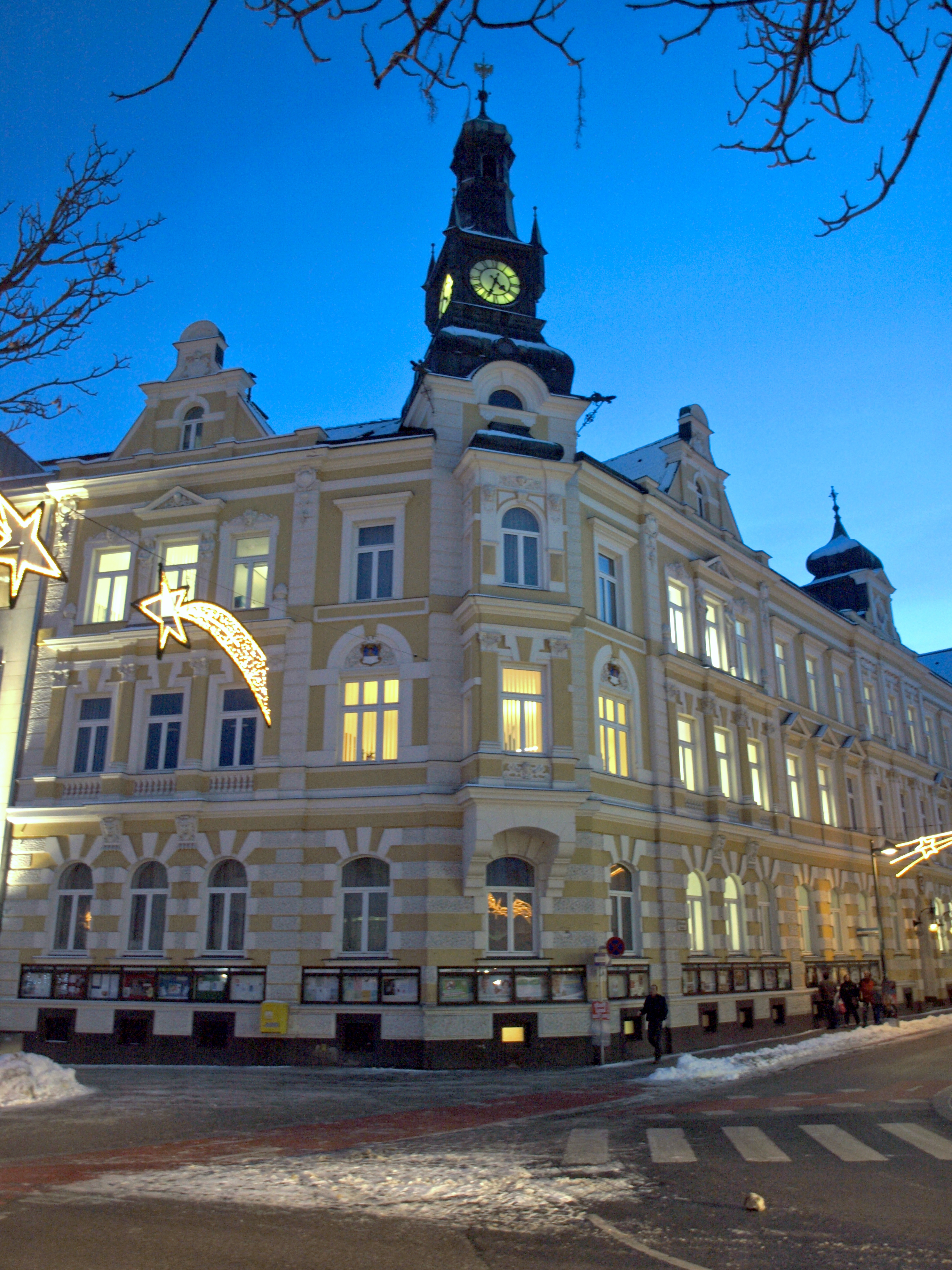 Rathaus